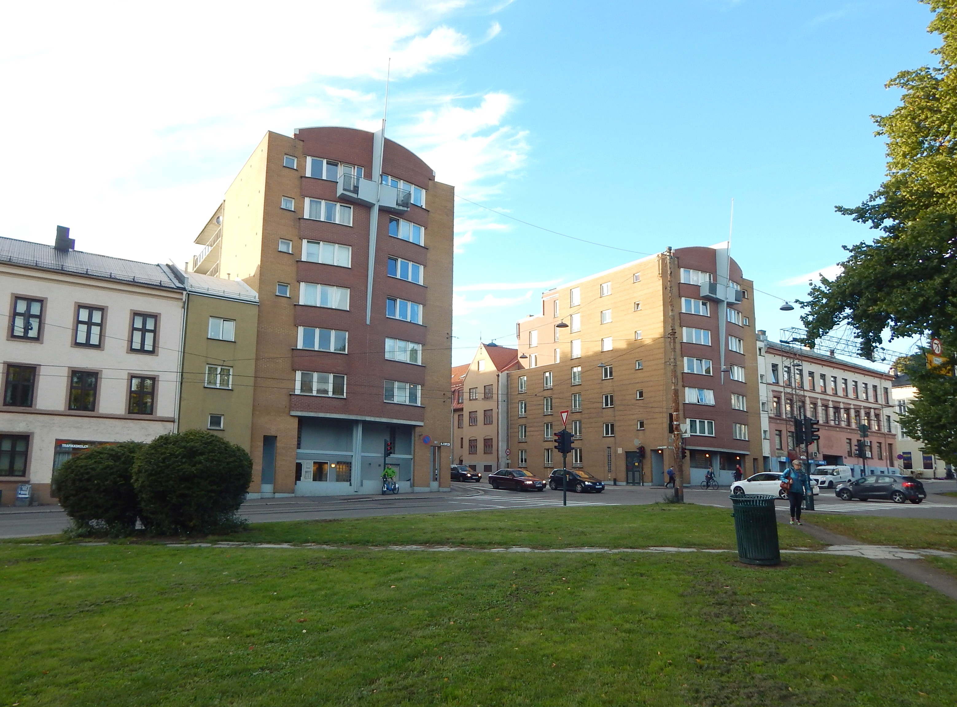 Vogts gate 10 og 28 på hver sin side av Marcus Thranes gate, med Hallénparken foran